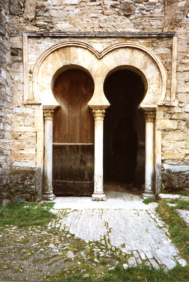 Arcos mozárabes con alfiz de Santiago de Peñalba en León (España)